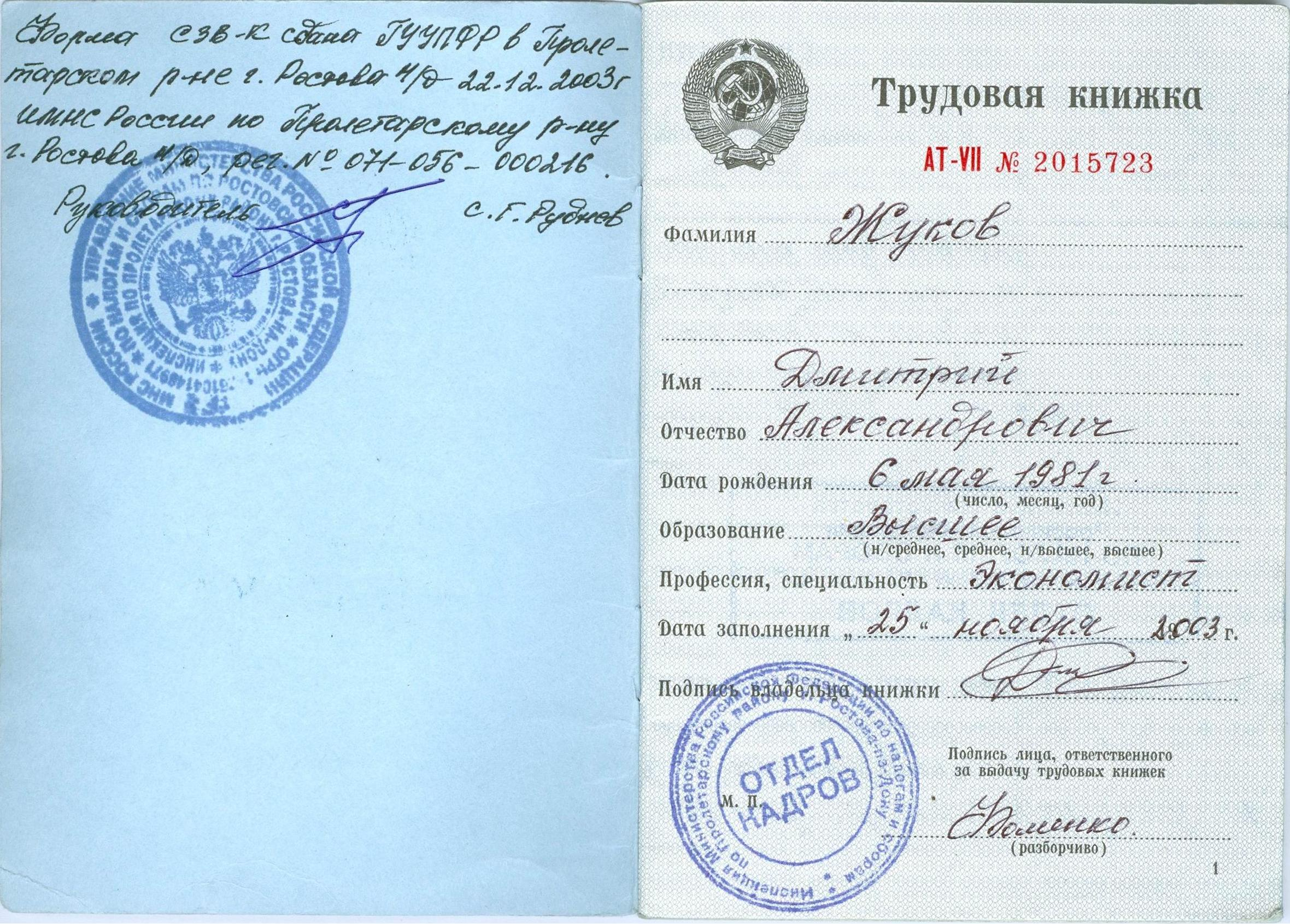 Трудовая книжка СССР образца 1974 года, серия АТ-VII.